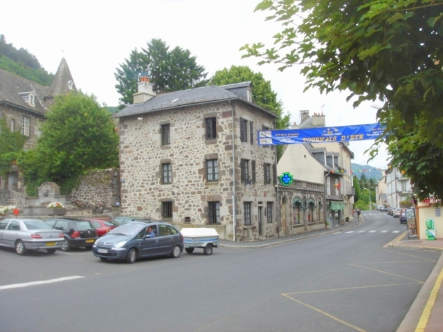 Traversée de Vic-sur-Cère par la Nationale 122